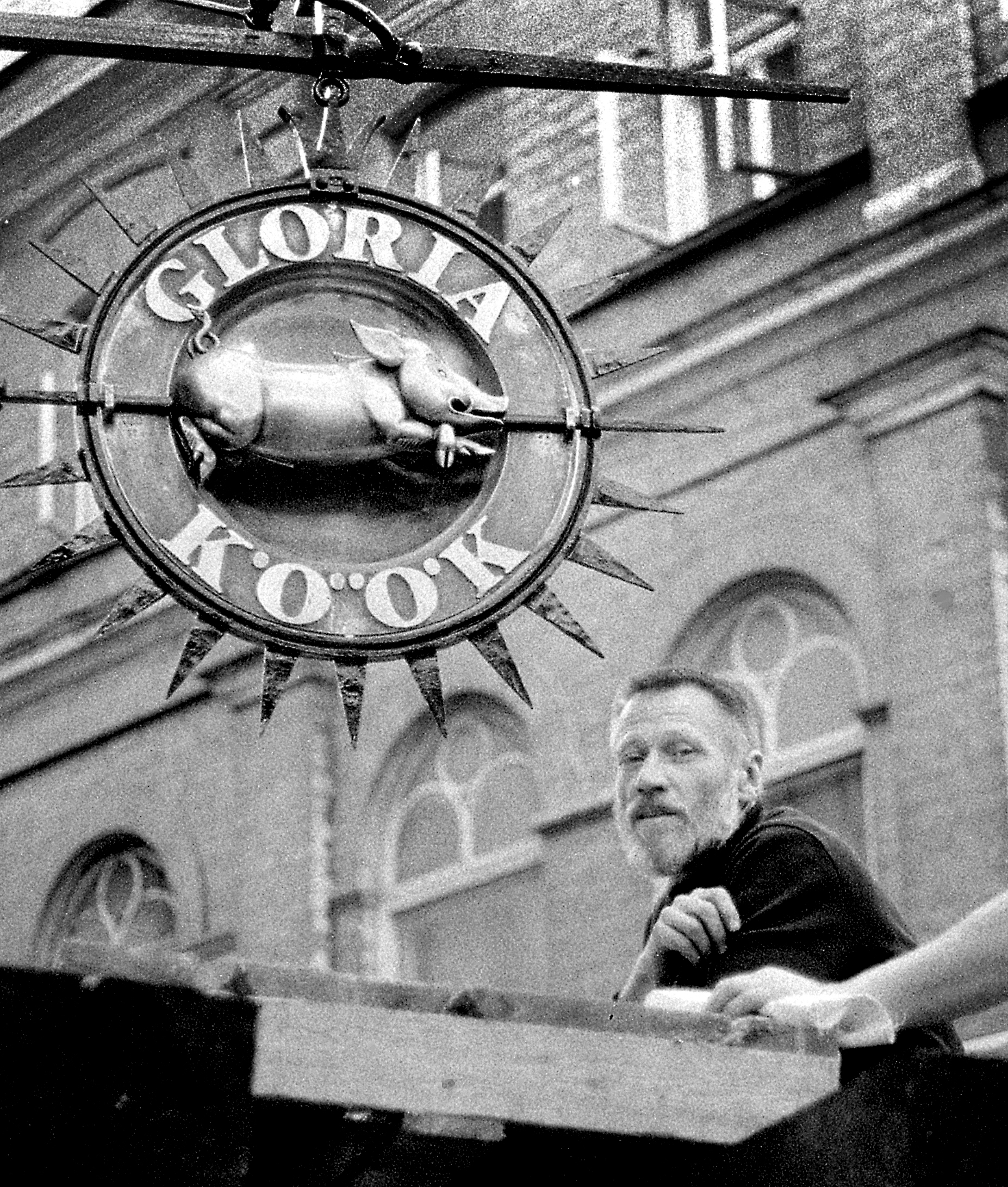 Heino Müller oma taiesega.